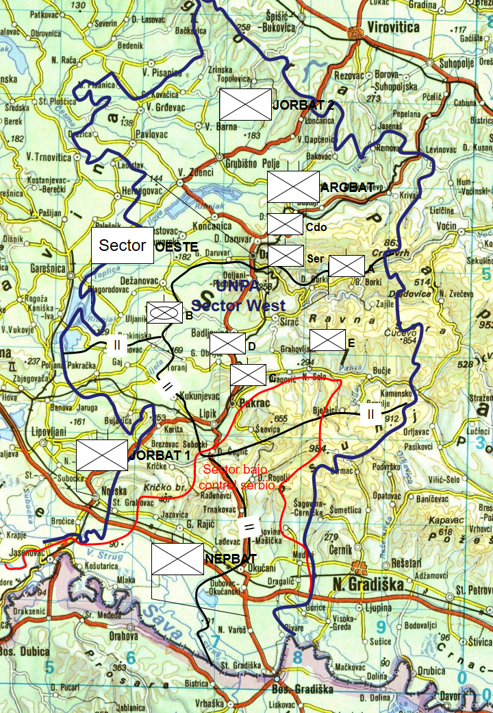 Ubicación de las distintas compañía del BEA en Marzo 1994